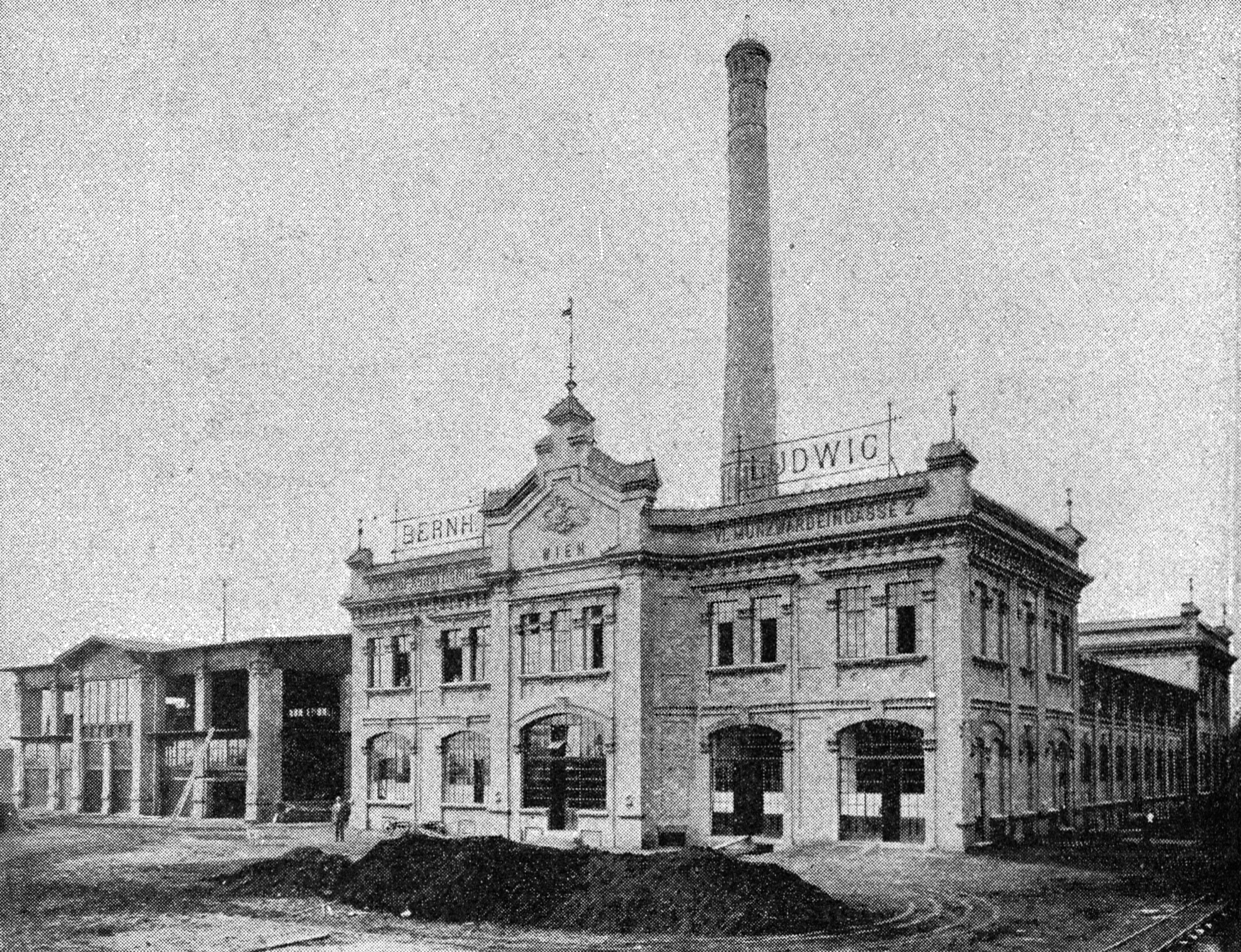 Möbelfabrik Bernhard Ludwig in der Gärtnergasse in Liesing südlich von Wien (später: Wien 23, Liesing, Färbermühlgasse 13). Rechts ein Gleis der Schleppbahn dieses Betriebes, der auch eine normalspurige Anschlussbahn zur Südbahn im Bereich des südlichen Bahnhofs von Liesing hatte.